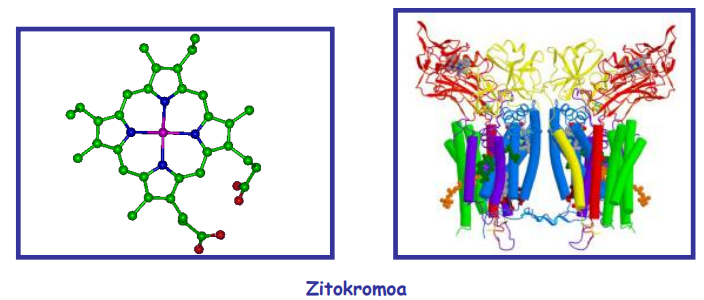 Zitokromoa